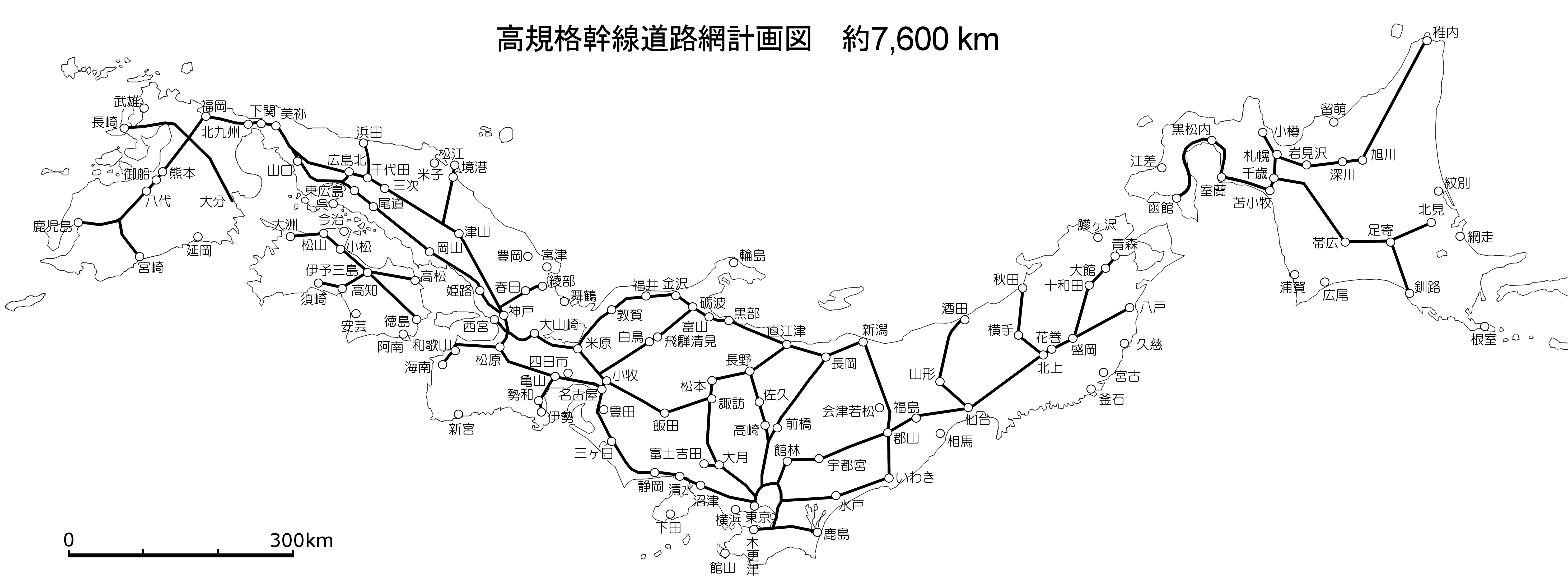 国土開発幹線自動車道建設法で制定された高速道路網7600km